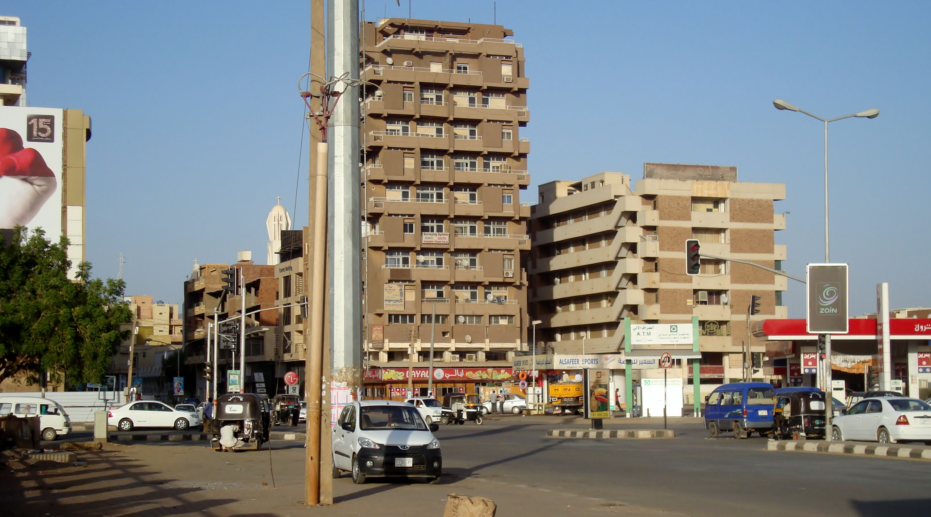 من أكبر تقاطعات الشوارع بالسودان الصورة ماحوذة من الغرب للشرق .